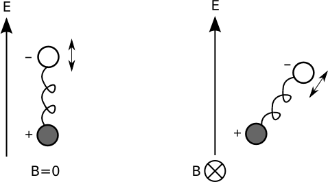 Effet d'un champ magnétique sur un dipole (modèle de l'électron élastiquement lié)